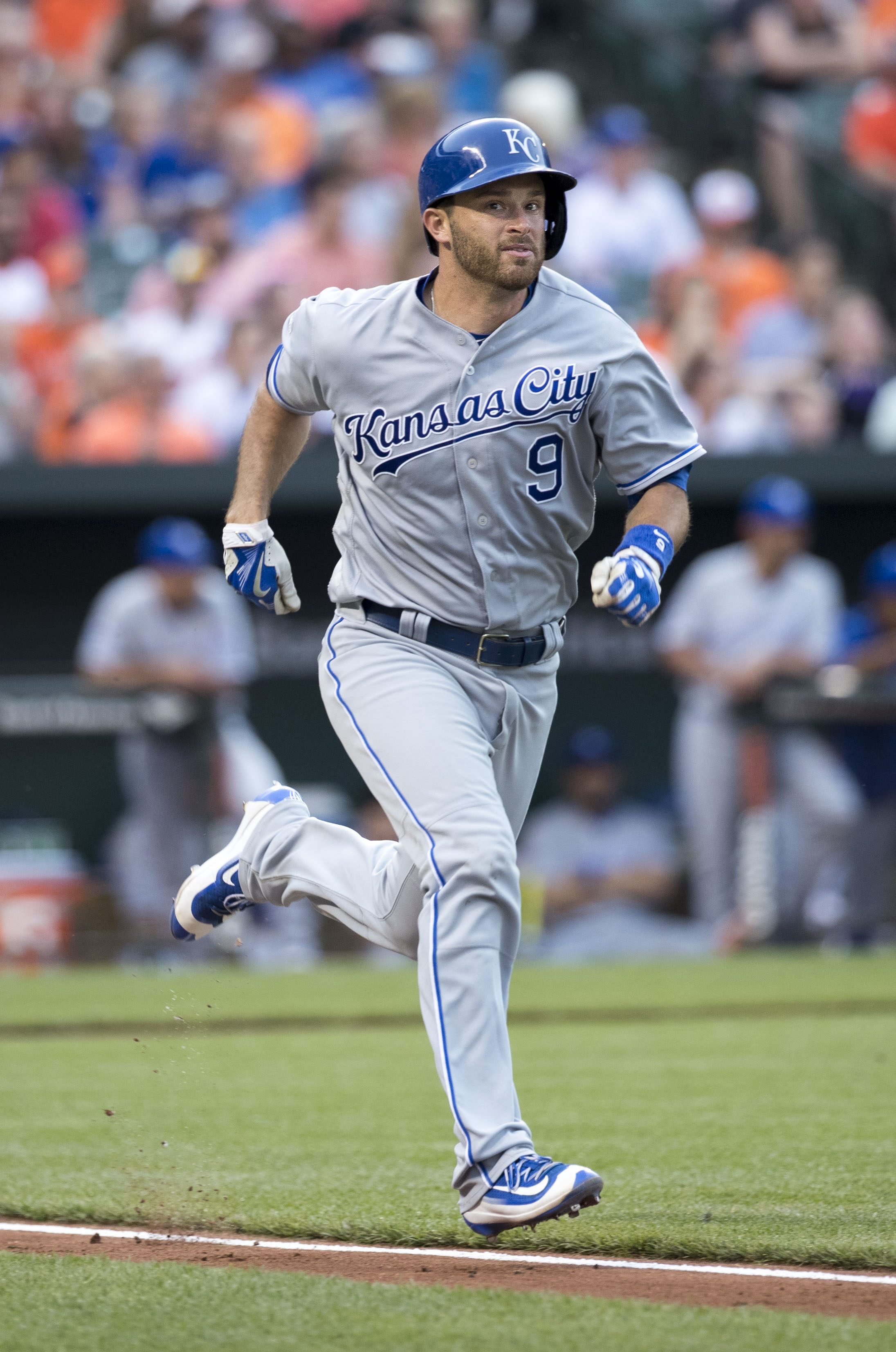 Drew Butera